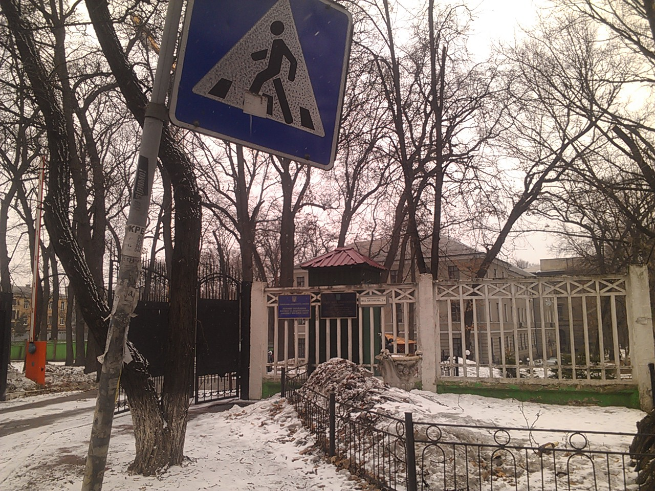 КВВАИУ, Киев, Украина. Военная прокуратура в одном из корпусов училища.